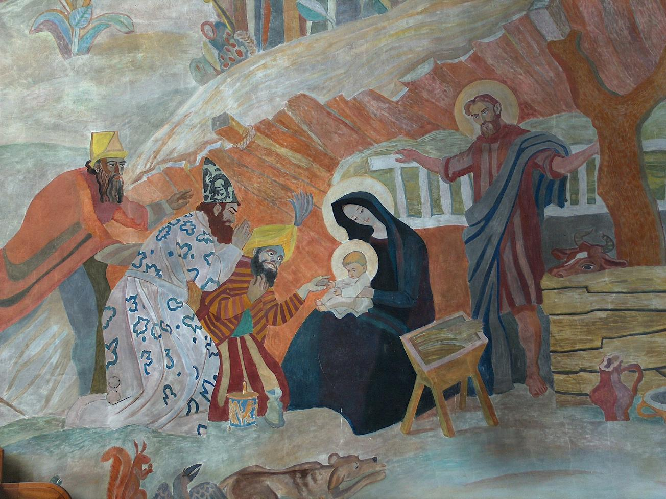 Zbigniew Łoskot, fresk z kościoła Wyższego Seminarium Duchownego w Ołtarzewie, przedstawiający pokłon Trzech Króli (fragment)